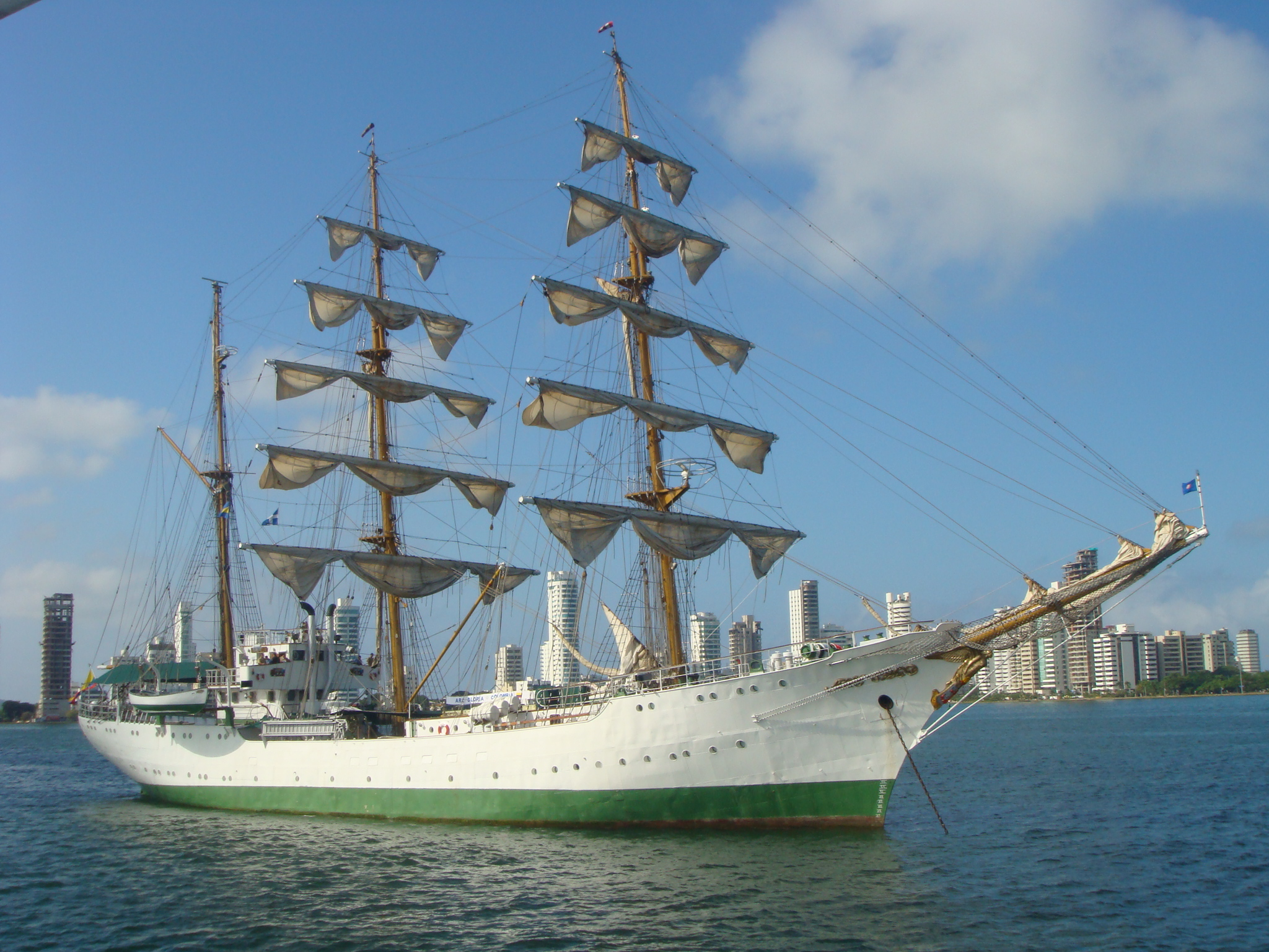 "El ARC Gloria es el buque escuela perteneciente a la Armada de Colombia y el buque insignia de su academia naval" Wikipedia